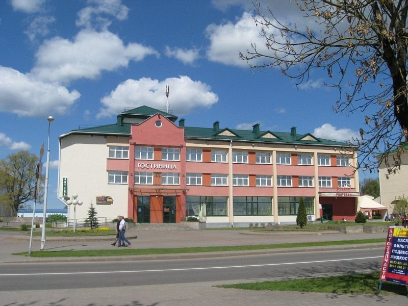 Астравец. Гасцініца